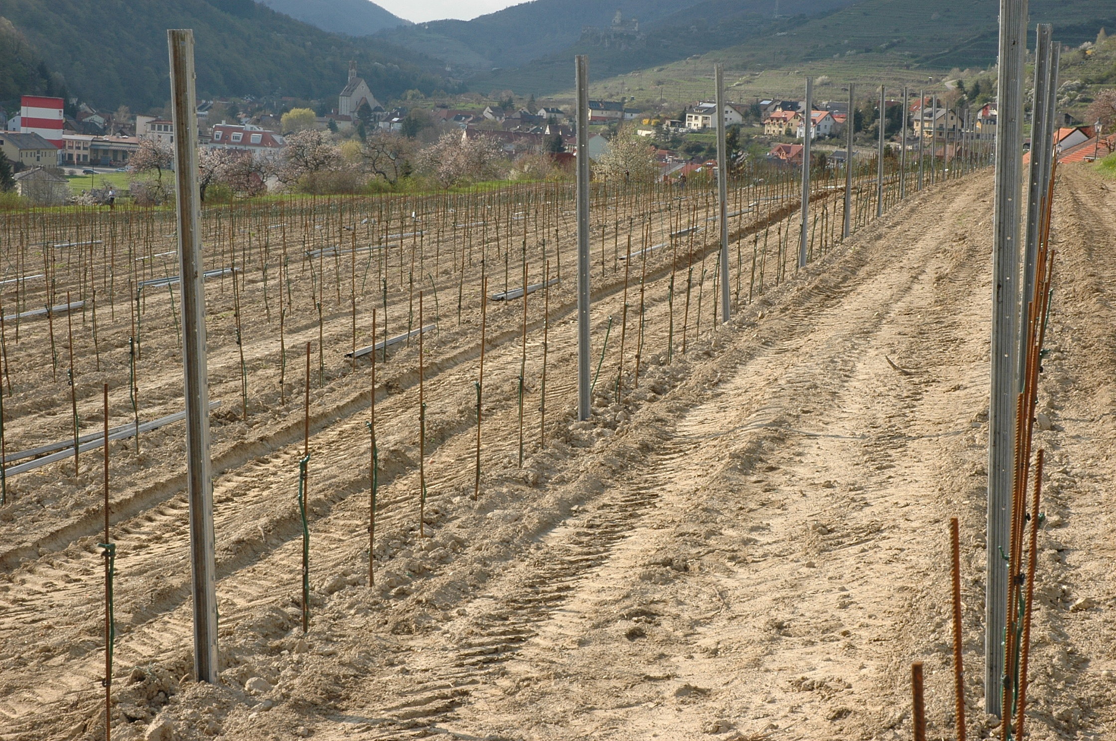 Junganlage mit erstellter Unterstützung.